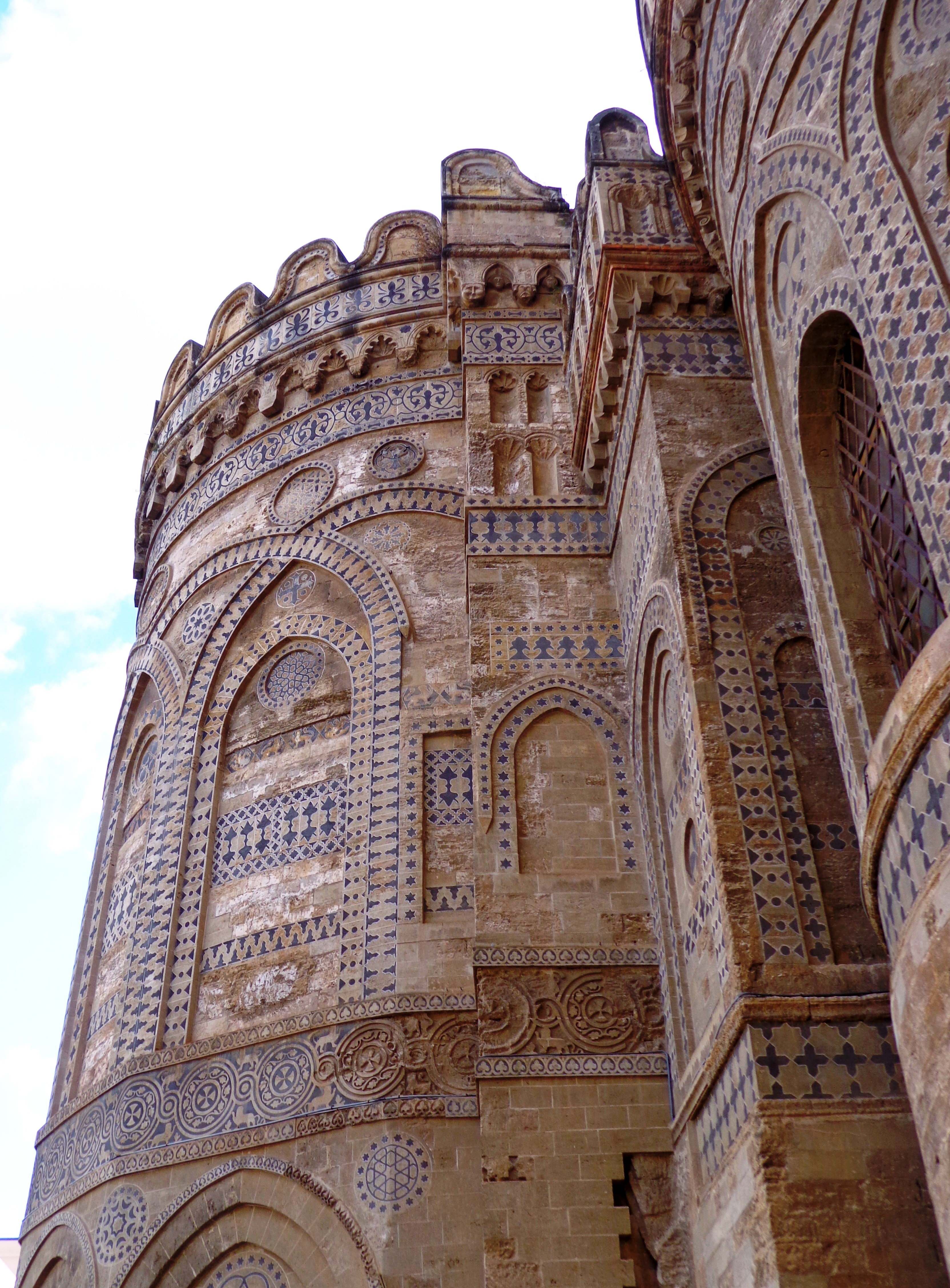 Esterno Abside